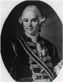 Eneskjöld Carl Fredrik.1738-1813. Amiral.Gåva av fru Millan Borgström.Karlskrona 17/2 1960. A 24 941. Bildnummer P 4071 Blekinge läns museum